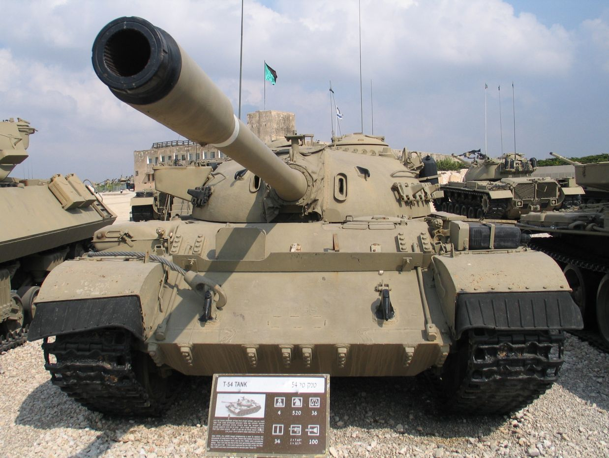 Tiran-4 MBT in Yad la-Shiryon Museum, Israel.